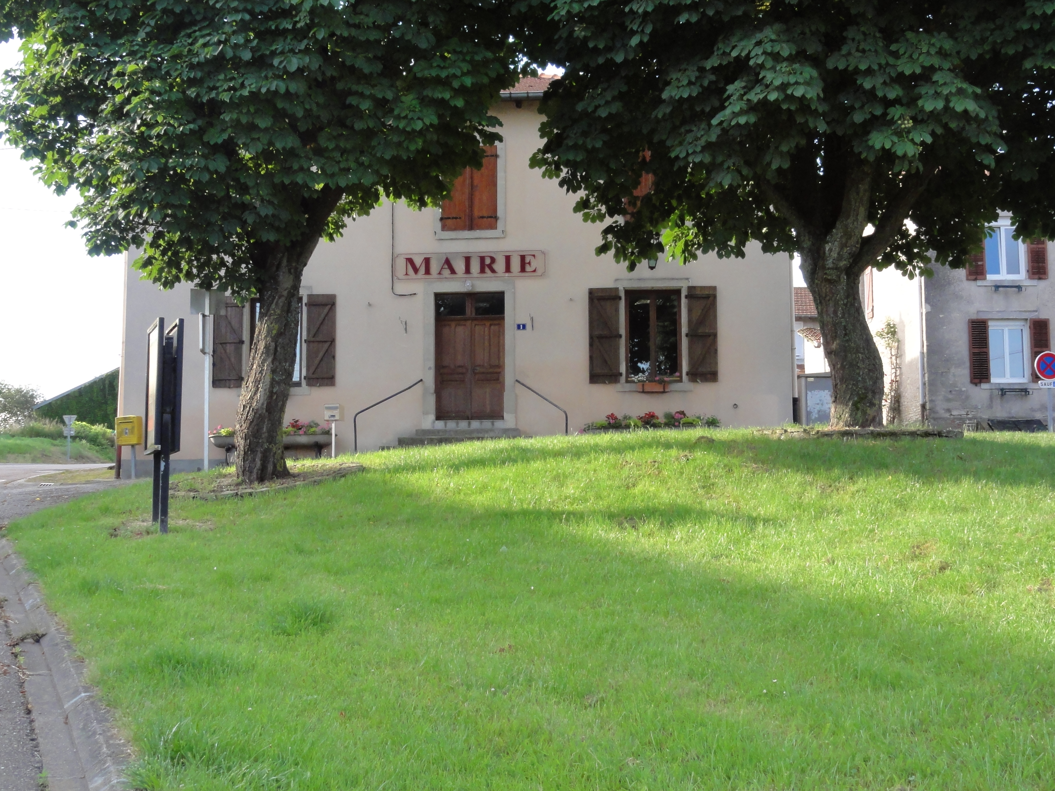 Bonviller (M-et-M) mairie